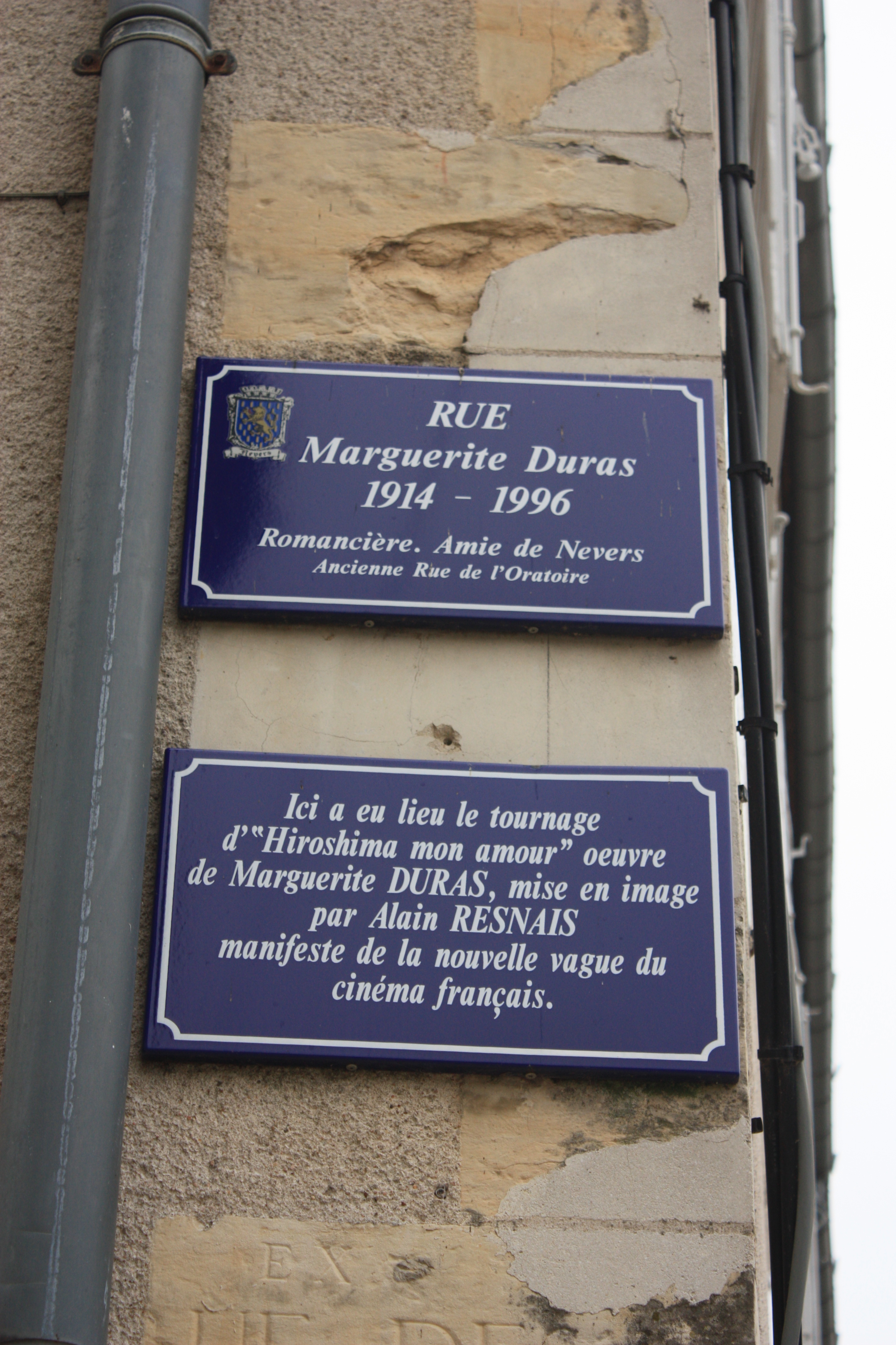 Plaque de la rue Marguerite Duras à Nevers et plaque commémorant le tournage du film Hiroshima mon amour.